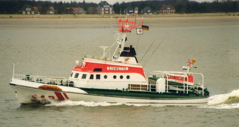 DGzRS Seenotkreuzer EISWETTE vor dem Wyker Südstrand